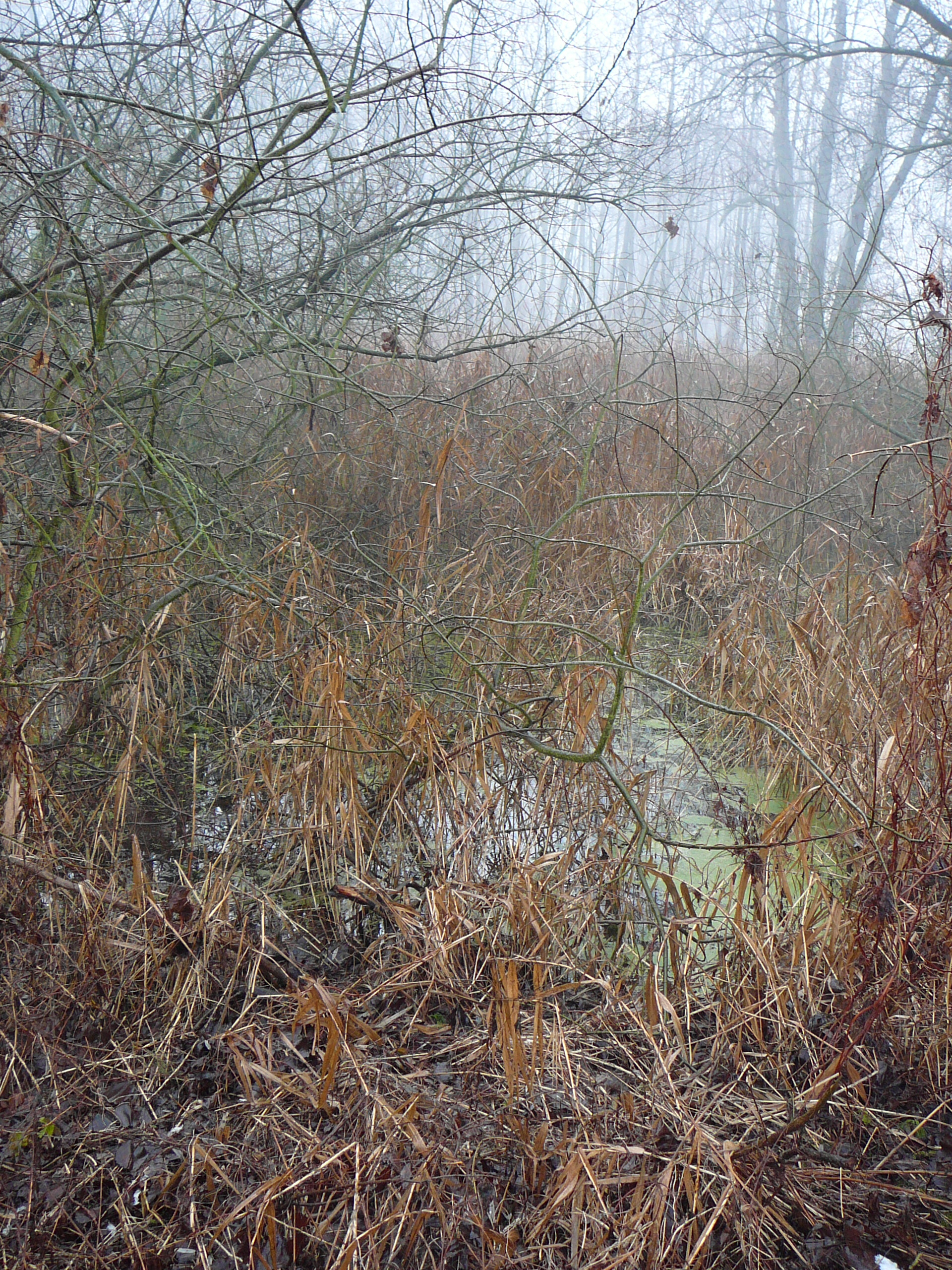 Tuňky